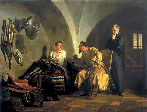 Это картина русского художника Николая Неврева «Дмитрий Самозванец у Вишневецкого». В 1604 г. в имении польского магната Адама Вишневецкого под городом Самбором (Западная Украина) появляется человек, называющий себя царевичем Димитрием, сыном Иоанна Грозного. Перед тем как направиться в Речь Посполитую, Григорий Отрепьев якобы побывал в монастыре у Марфы Нагой, матери царевича Димитрия, которая, по его словам, отдала ему единственную сохранившуюся у нее реликвию погибшего сына — наперсный крест. Его и показывает Лжедмитрий Вишневецкому, как доказательство того, что он настоящий царевич.